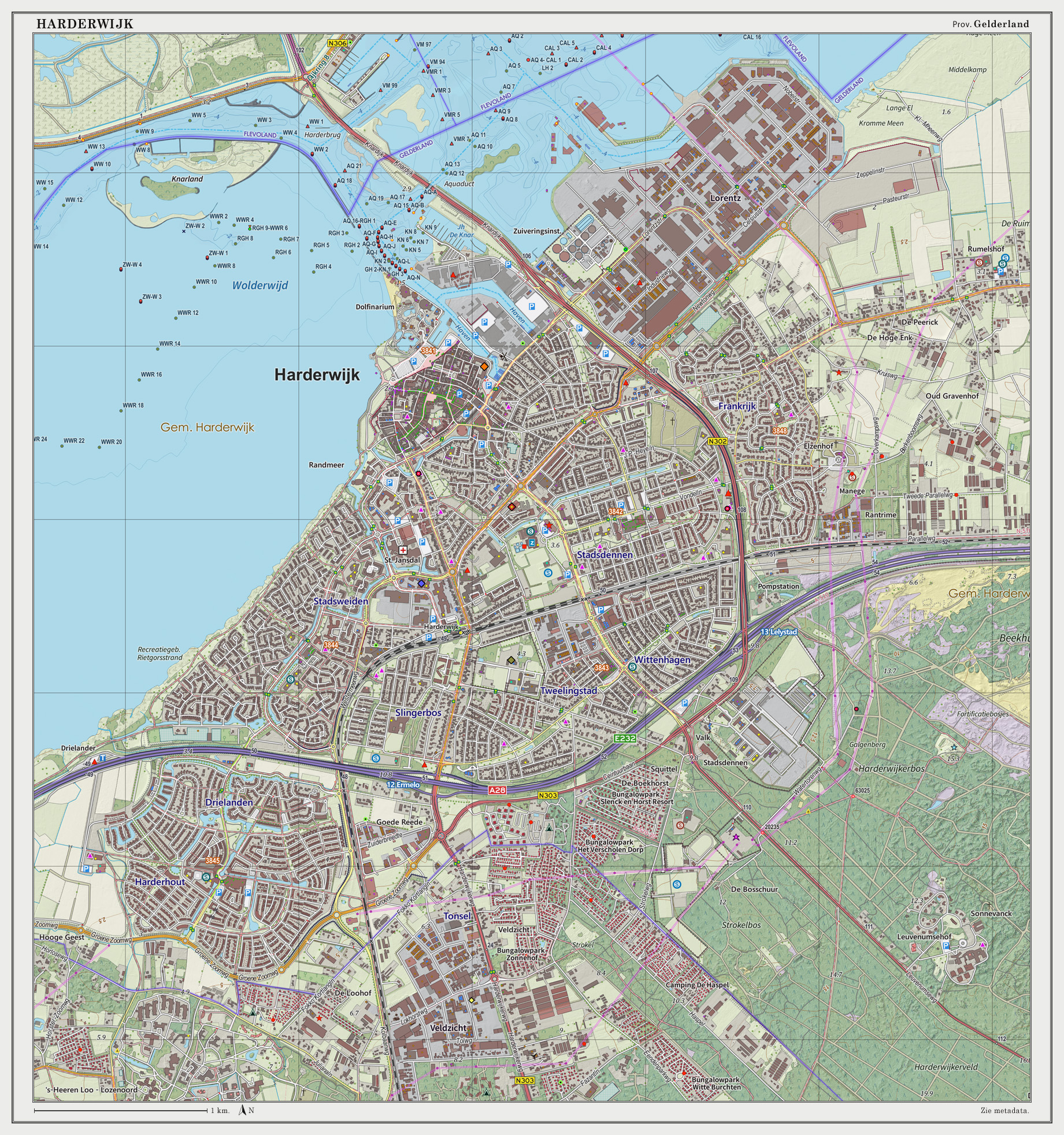 Topografische kaart van Harderwijk (woonplaats). Resolutie: 300 pixels/km. Kaartbeeld samengesteld uit de open geodata van de Top10NL en Top25namen (Basisregistratie Topografie, Kadaster), Creative Commons BY licentie. Gebouwvlakken uit open geodata BAG extract. Wegen uit de OpenStreetMap, OpenStreetMap community. Reliëfschaduw uit de Actuele Hoogtekaart AHN2. Samenstelling en kleurenschema: Jan-Willem van Aalst, met QGIS2. Zie ook de Legenda.